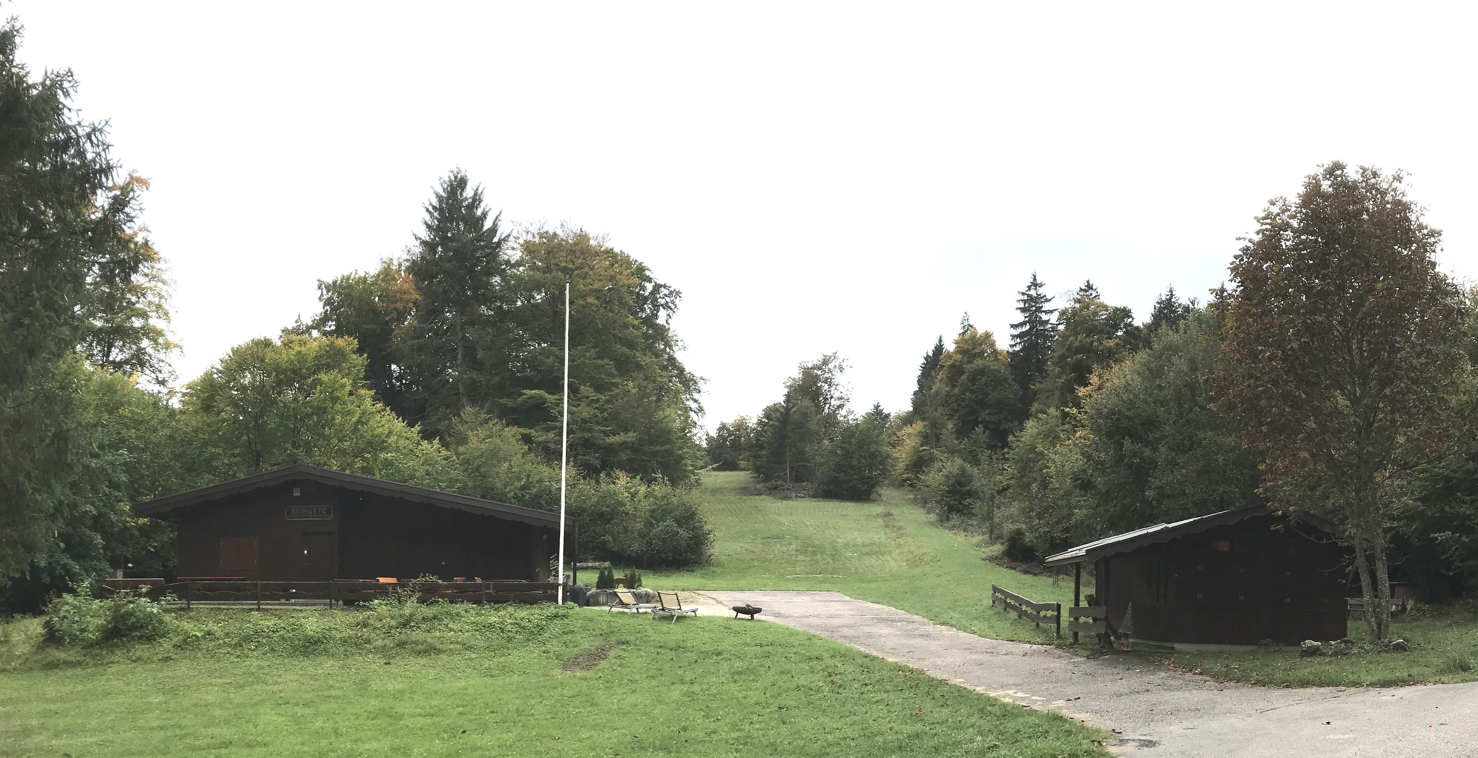 Volkmarsberg: Skihütte des TSV Oberkochen (links), in der Mitte der Skiübungshang, rechts das Liftstüble.